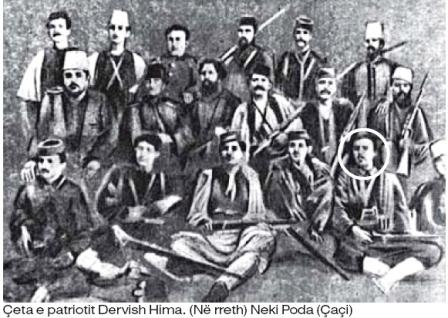 Четата на албанския политик Дервиш Хима.